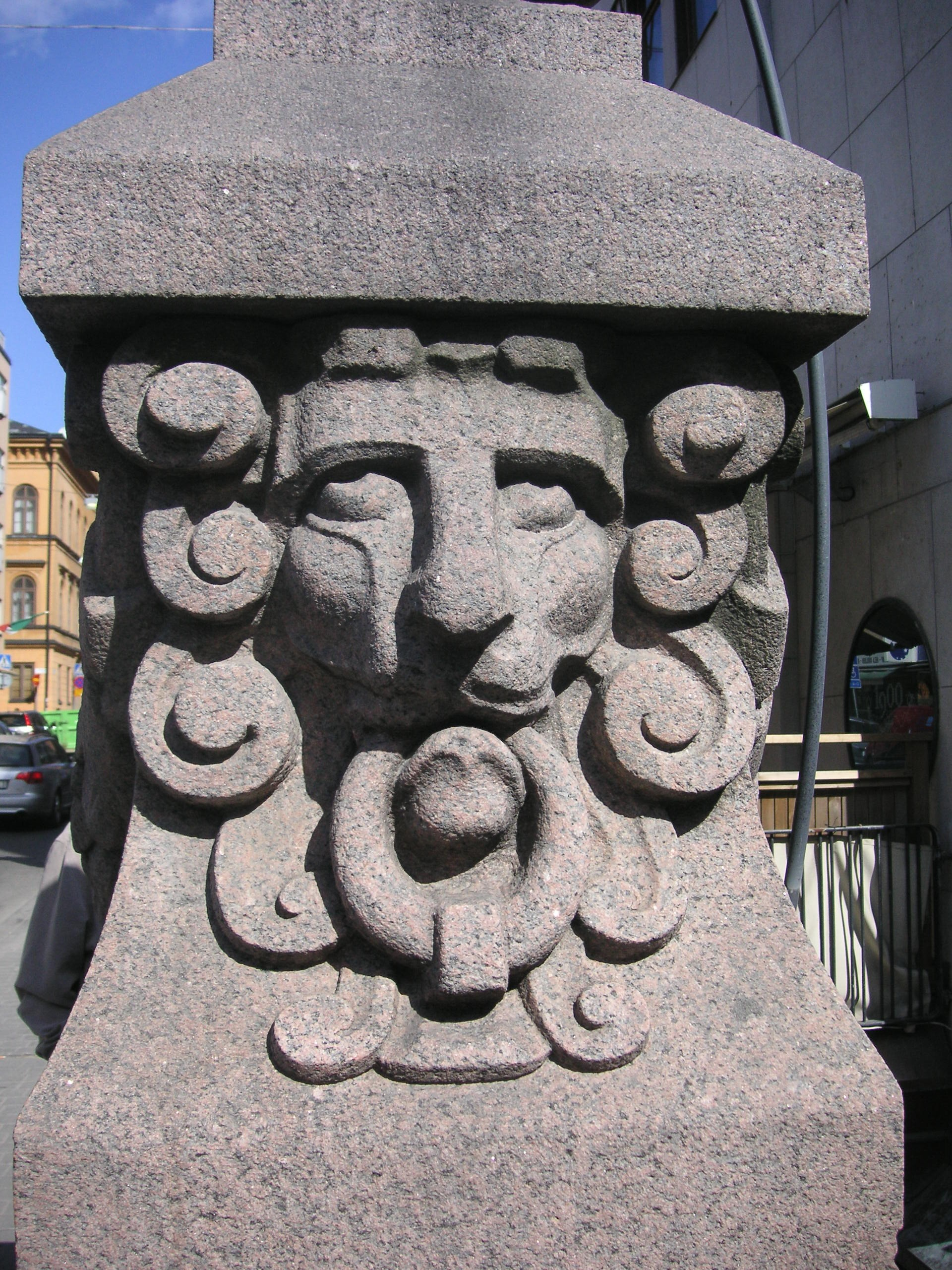 Utsmyckning på broräcket till bron över Regeringsgatan i Stockholm